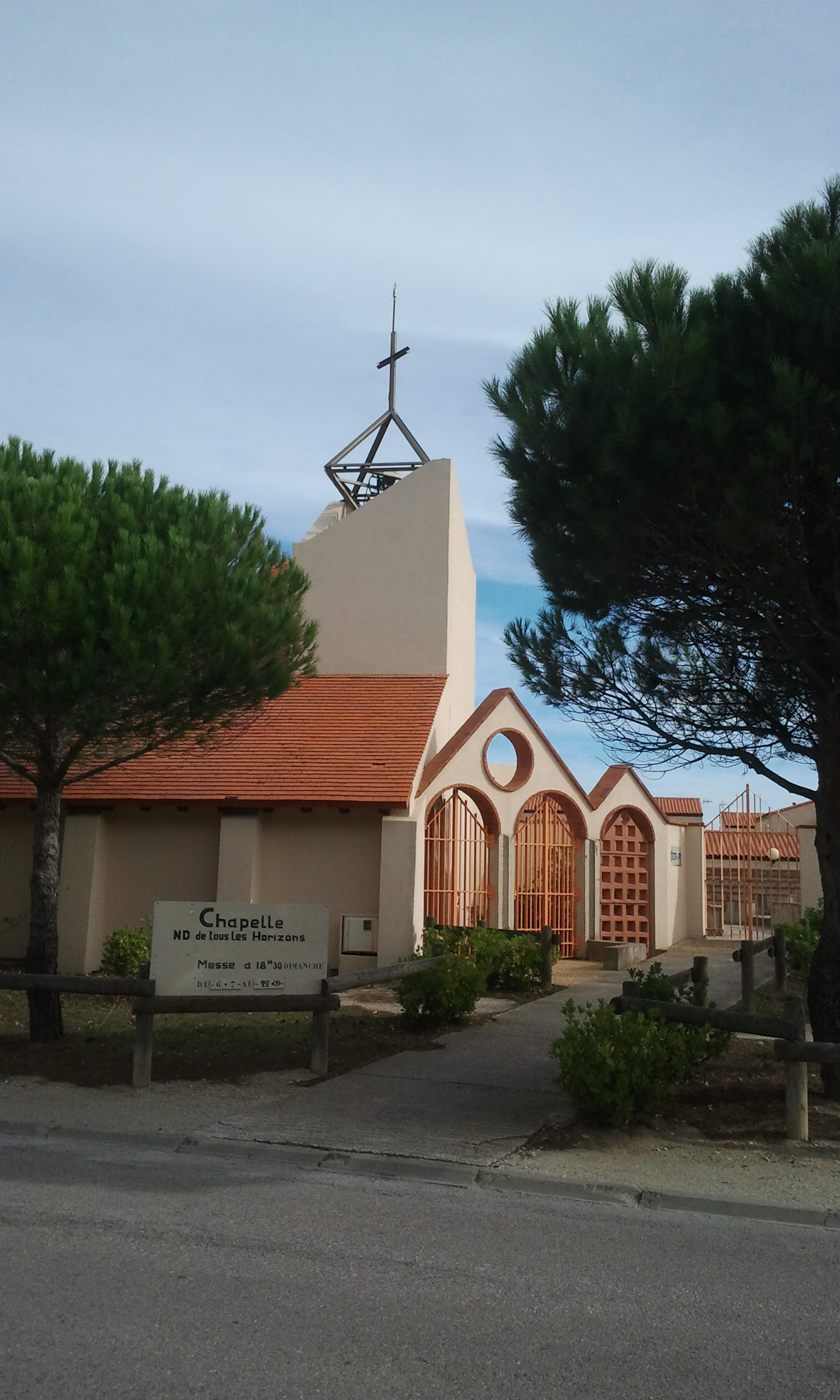 Chapelle Notre-Dame de tous les horizons